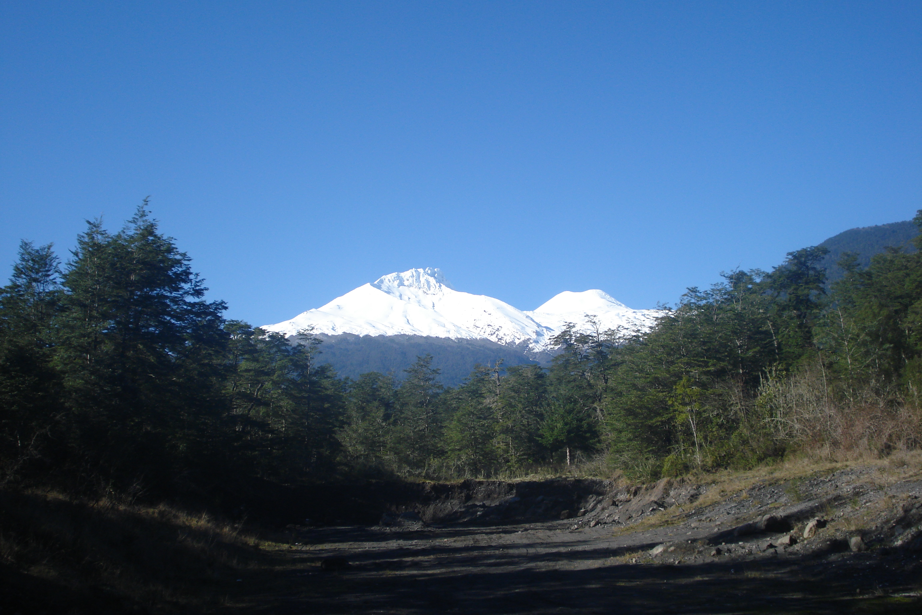 El volcán Mocho-Choshuenco desde el camino a Enco. La cumbre de la izquierda es el Choshuenco y la de la derecha, el Mocho.